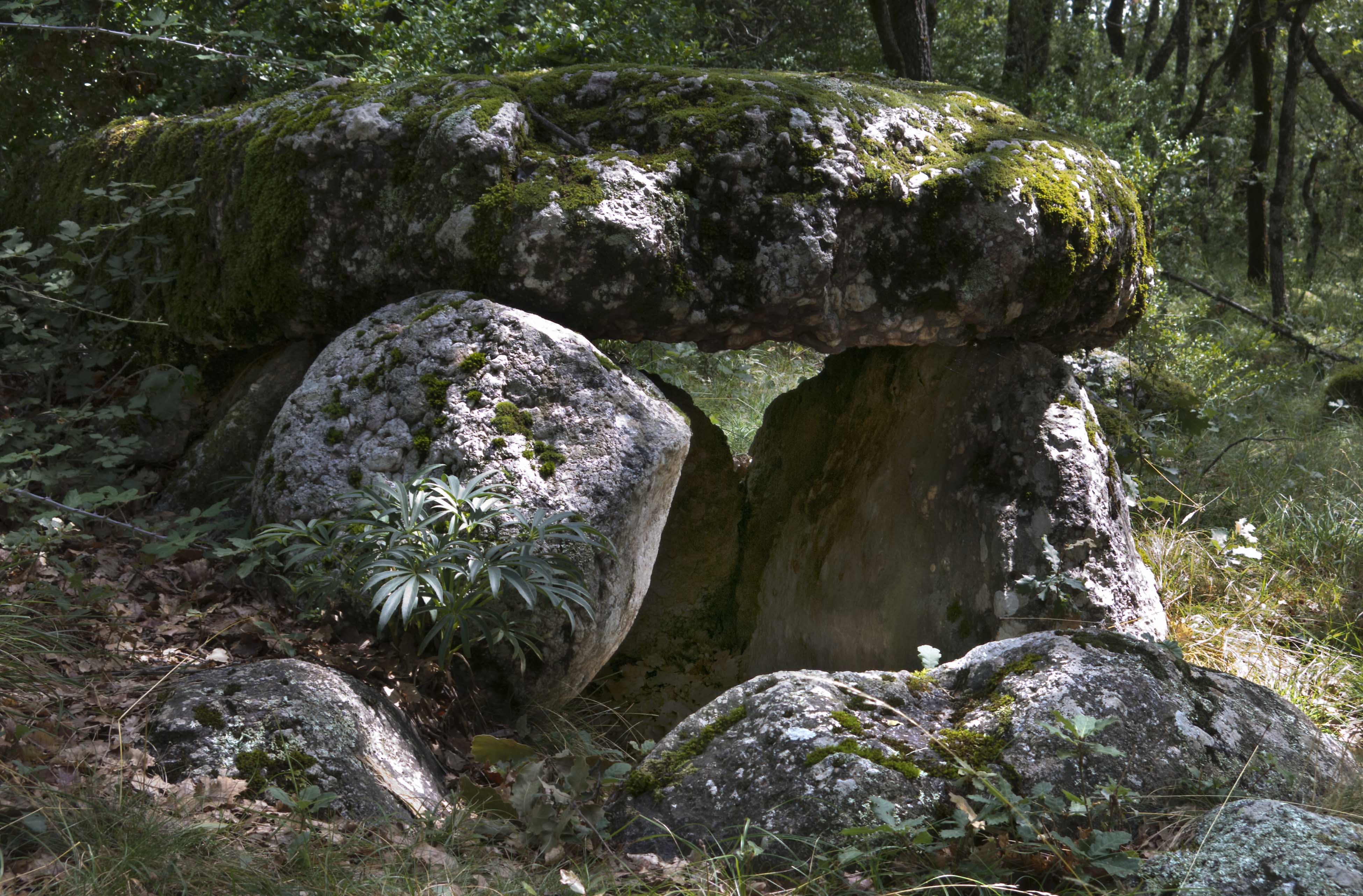 En Areny de Noguera, a la Baixa Ribagorça. És una construcció megalítica, del neolític.